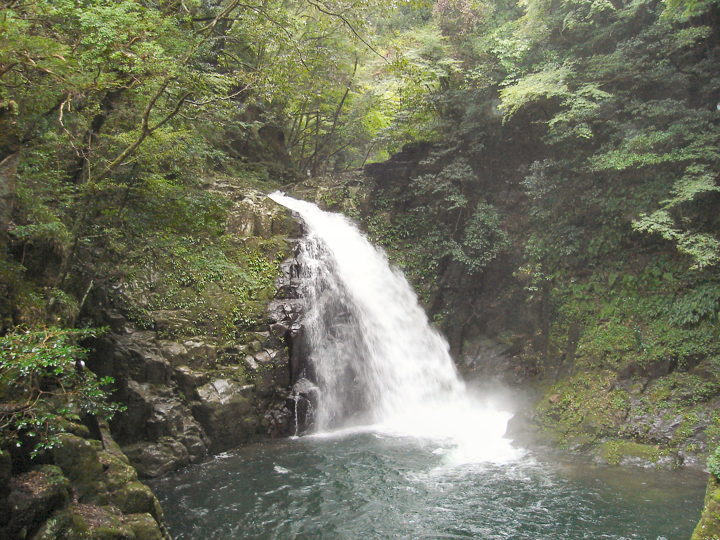 FudoTaki one of Akame Shijyu-Hachi Taki (Akame 48 Falls)